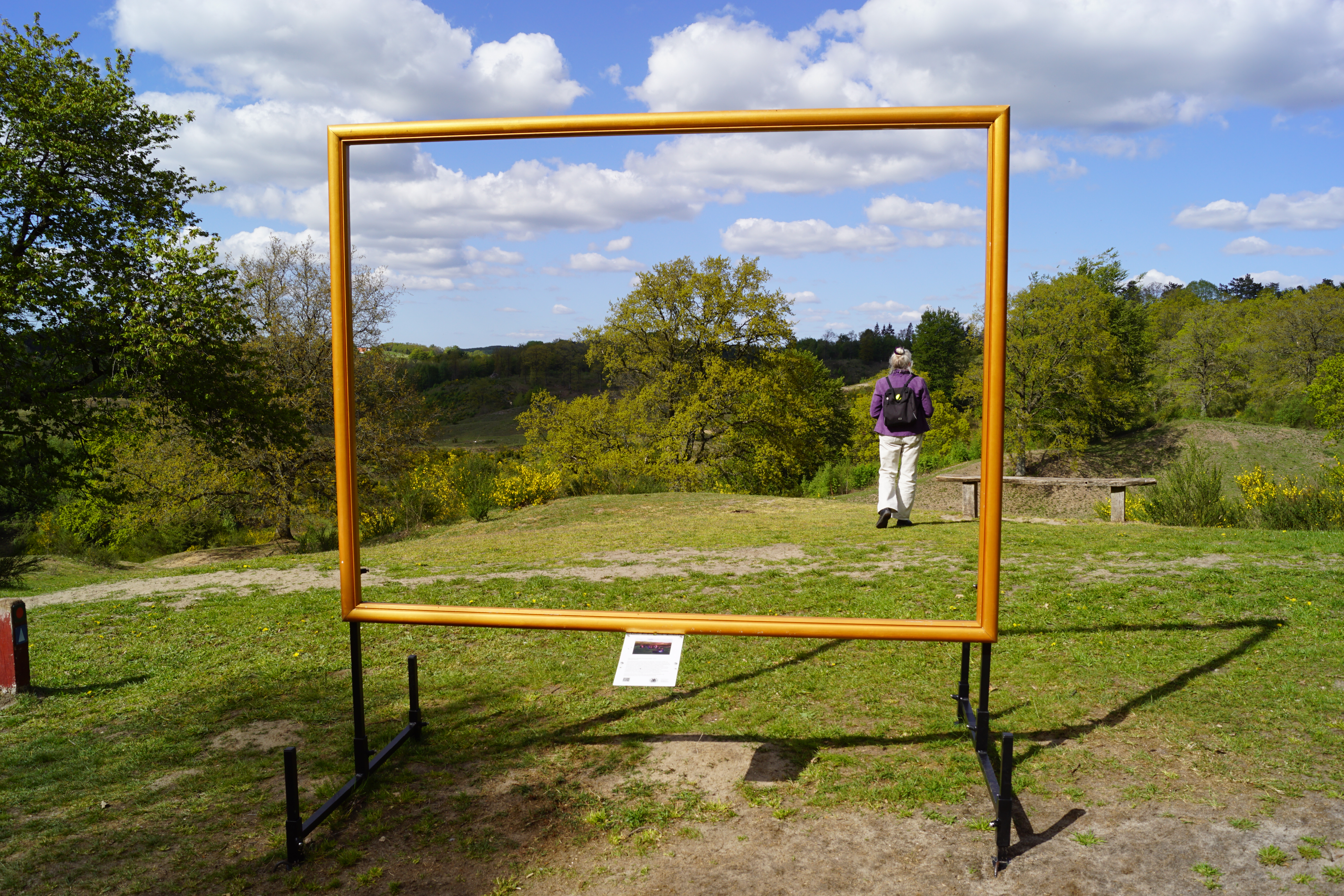 Faaborg Museums indramning af udsigten til motivet i Fritz Sybergs maleri "Aftenleg i Svanninge Bakker"